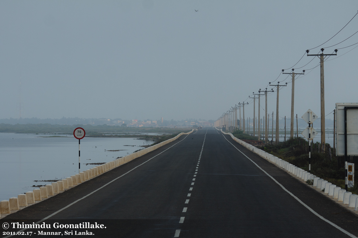 Mannar, Sri Lanka.